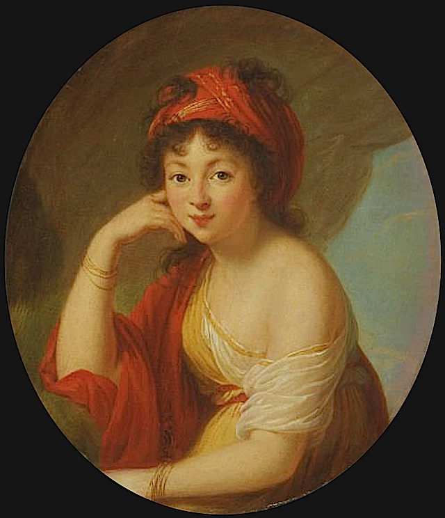 Pelagia z Potockich Sapieha